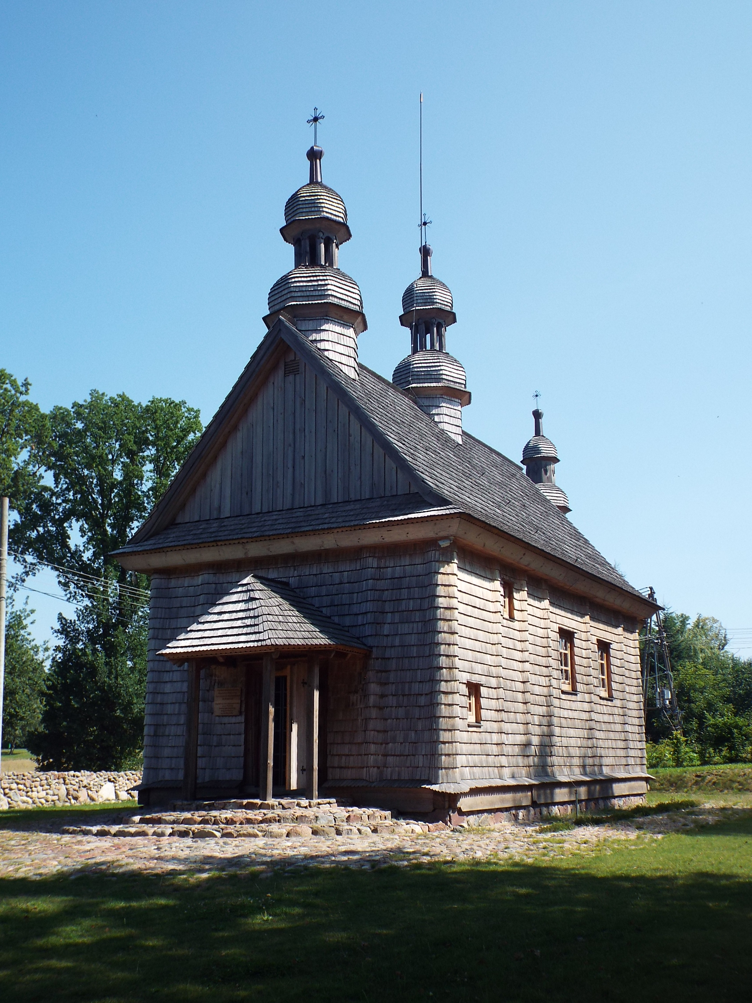 Godkowo - cerkiew greckokatolicka pw. Opieki Matki Bożej.